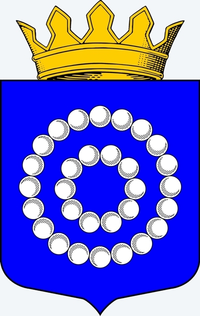 Герб Кемского муниципального района, Республика Карелия.